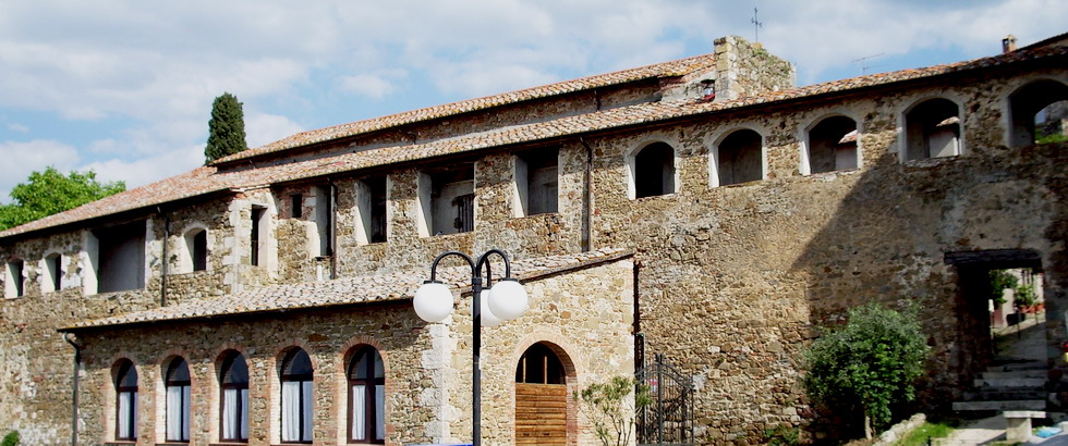 Mura di Montemerano